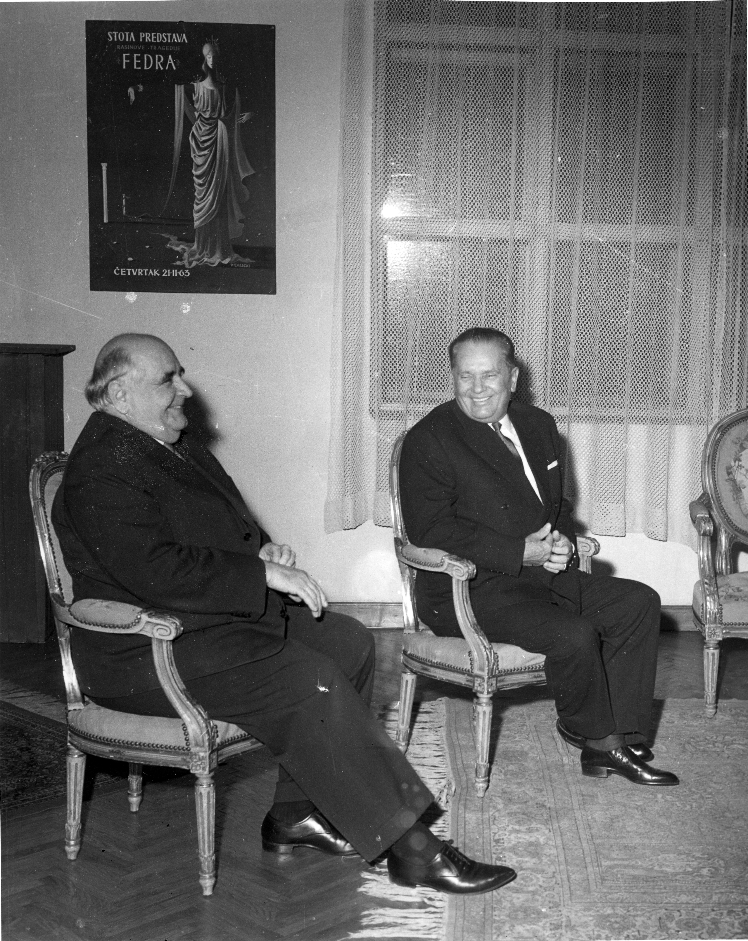 Miroslav Krleža i Tito, Narodno pozoriste, 100 predstava Fedra.foto: Stevan Kragujević (po odobrenju kćerke Tanje Kragujević)